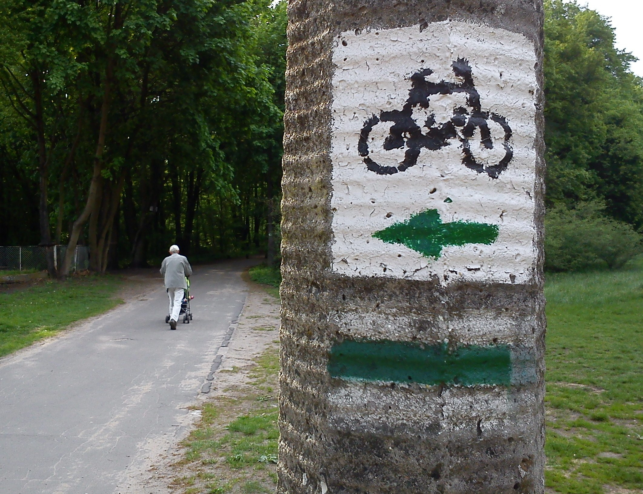 Golęcin, trasy spacerowe w Poznaniu.